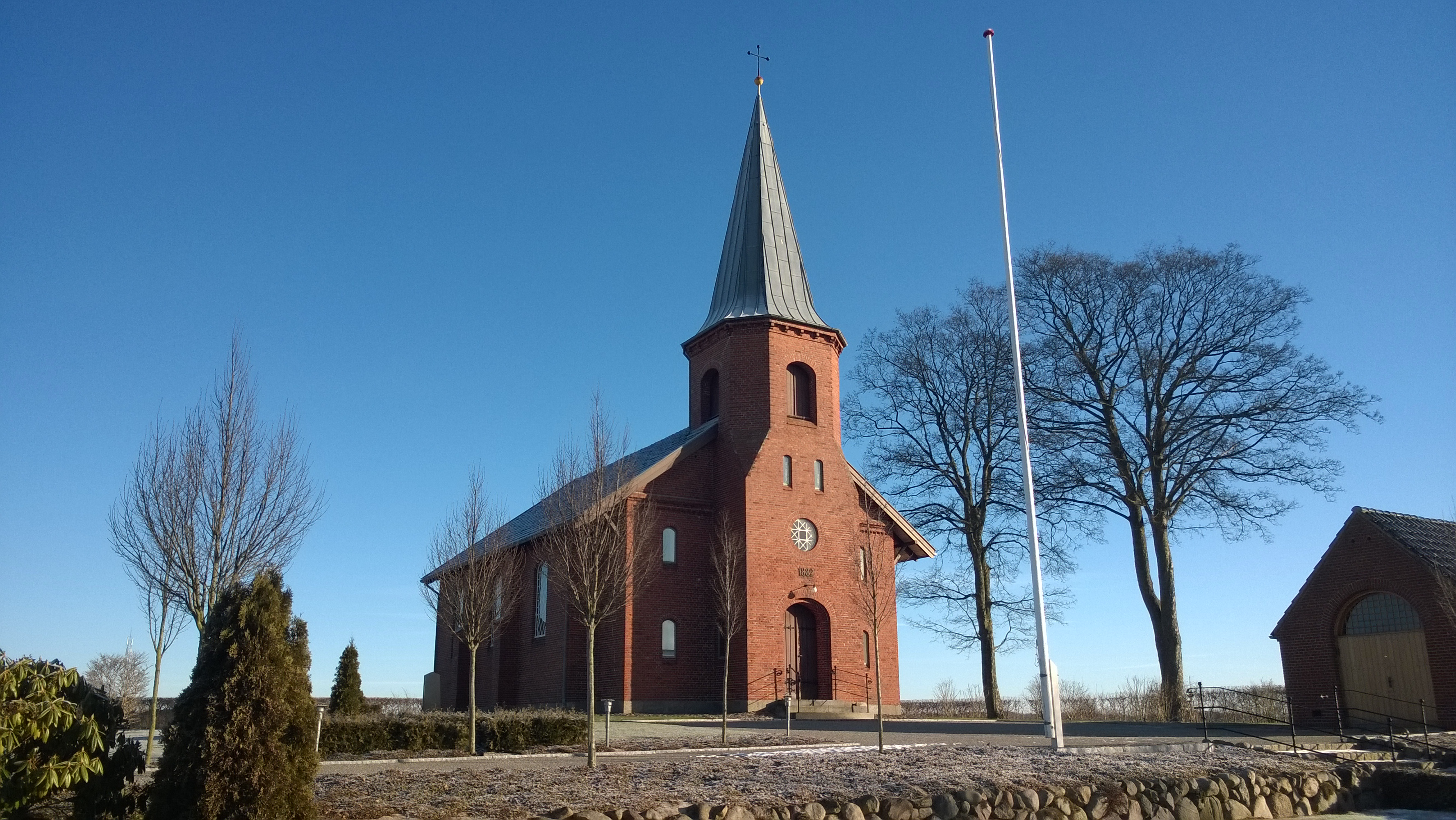 Hjulby Kirke, Stationsvej 19 A, Hjulby, 5800 Nyborg; set fra V